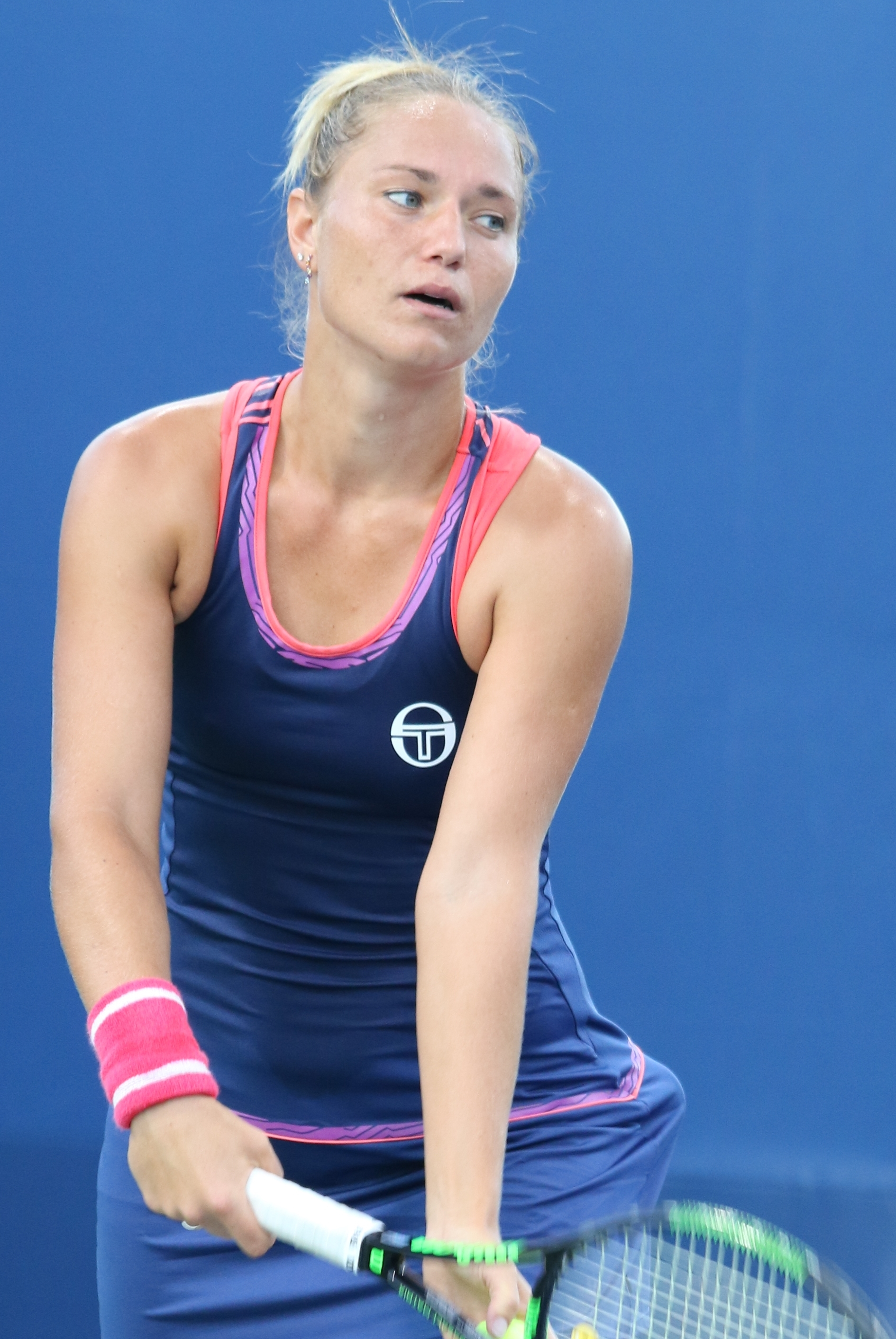 Bondarenko K. US16 (1)